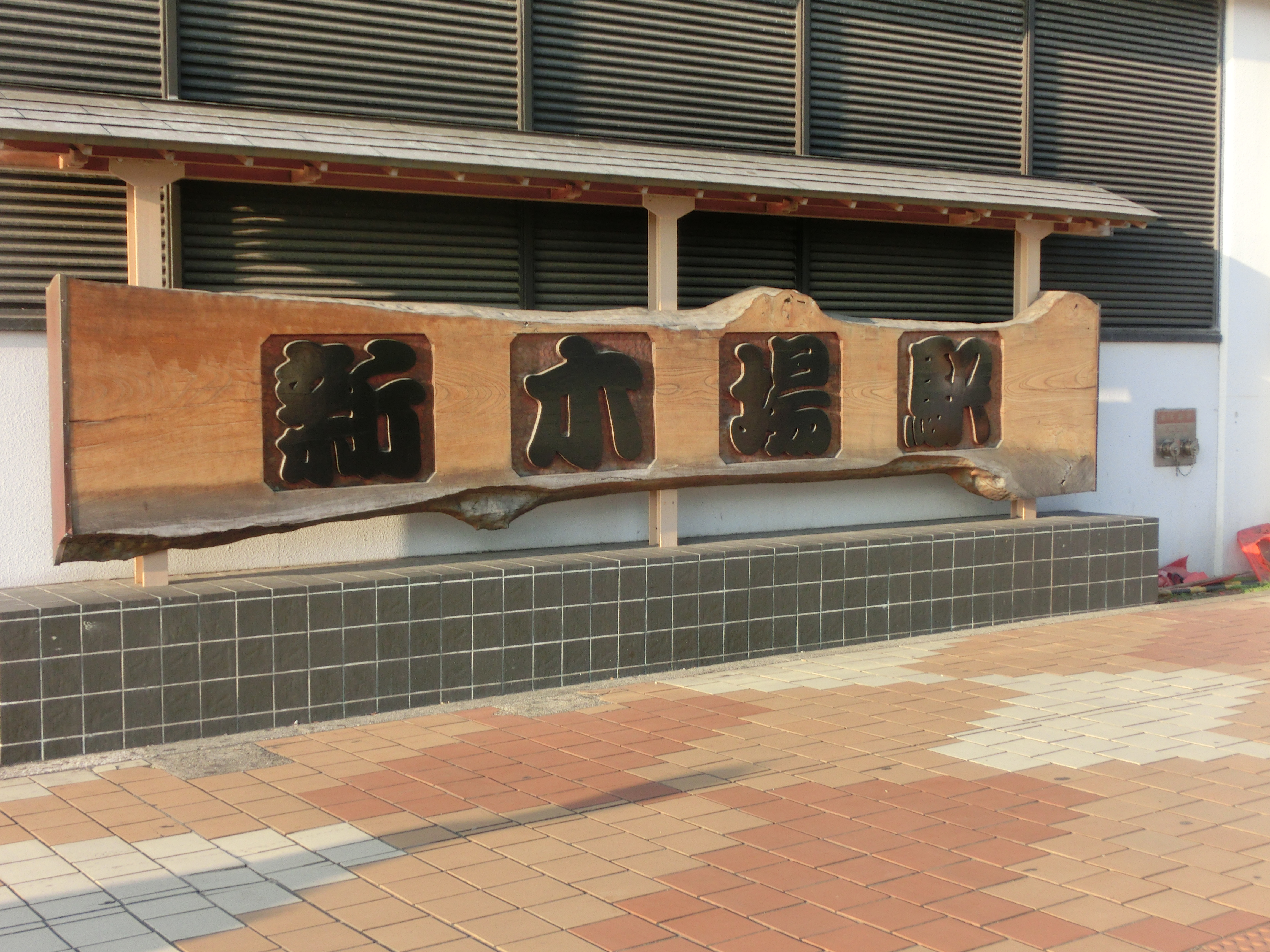 新木場風景2016